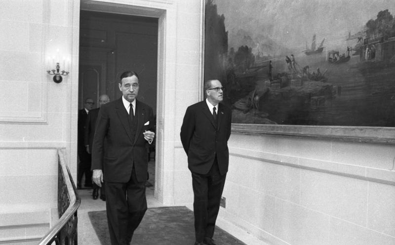 Einweihung der deutschen Botschaftsresidenz, Palais Beauharnaise, in Paris. Schlüsselübergabe durch Bundesminister Schmücker und Besichtigungsrundgang der Minister Wehner und Schmücker